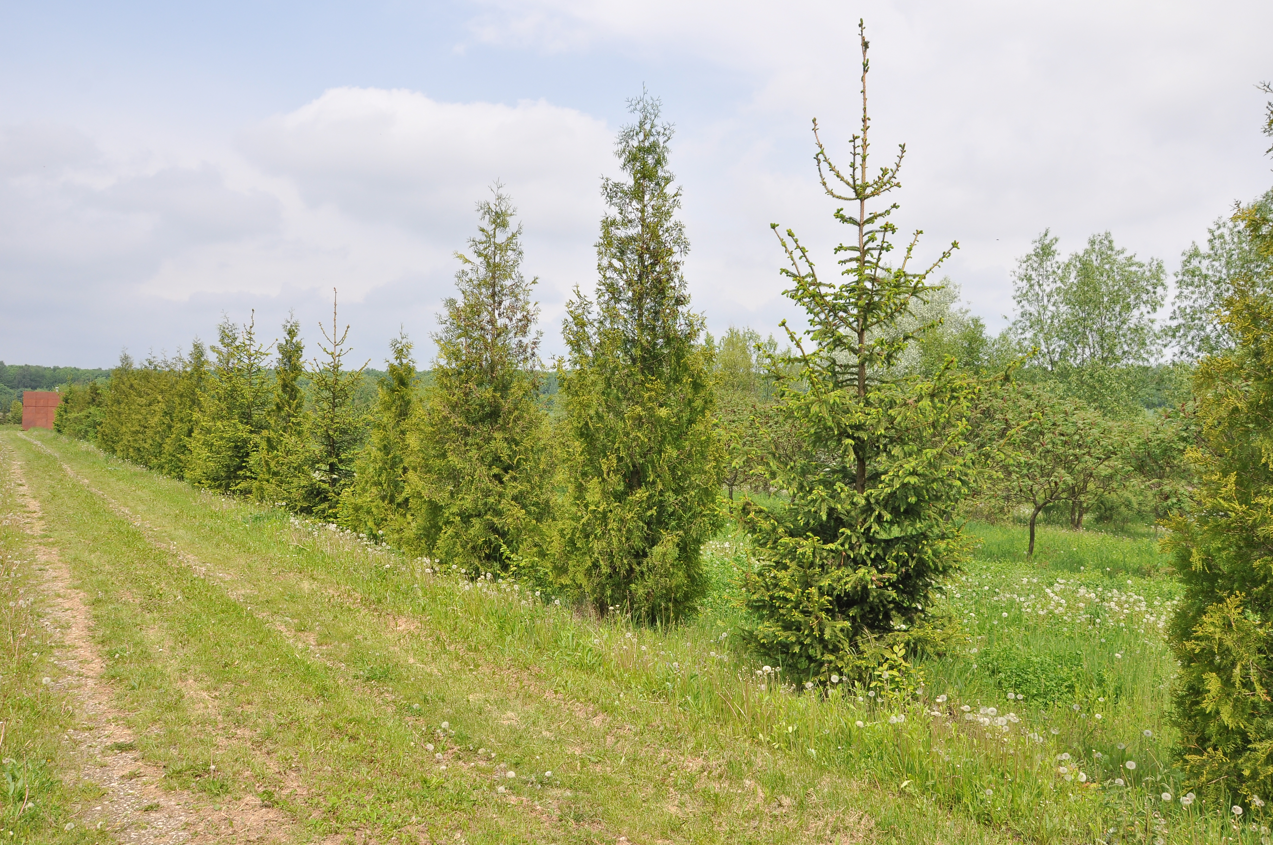 Ботанічний сад «Червона калина» на території навчально-оздоровчого комплексу «Червона калина» Тернопільського державного медичного університету поблизу смт Дружба та с. Лошнів Теребовлянського району.